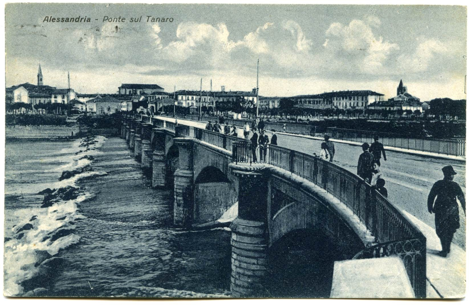 Collezione di Tony Frisina - Alessandria